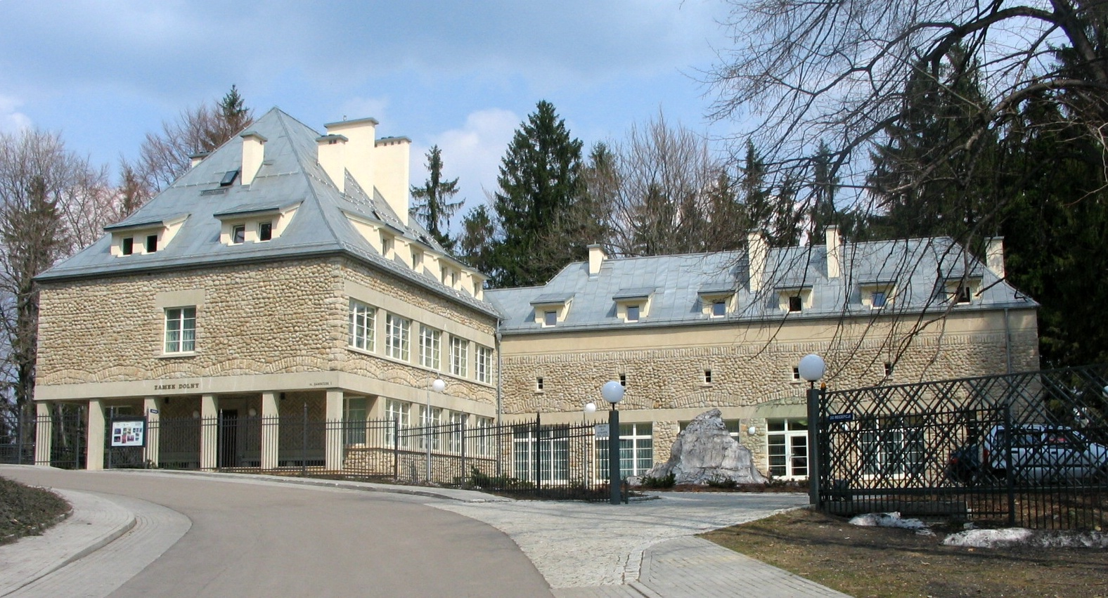 Wisła - Zameczek Prezydenta - Zamek dolny (obecnie Hotel)